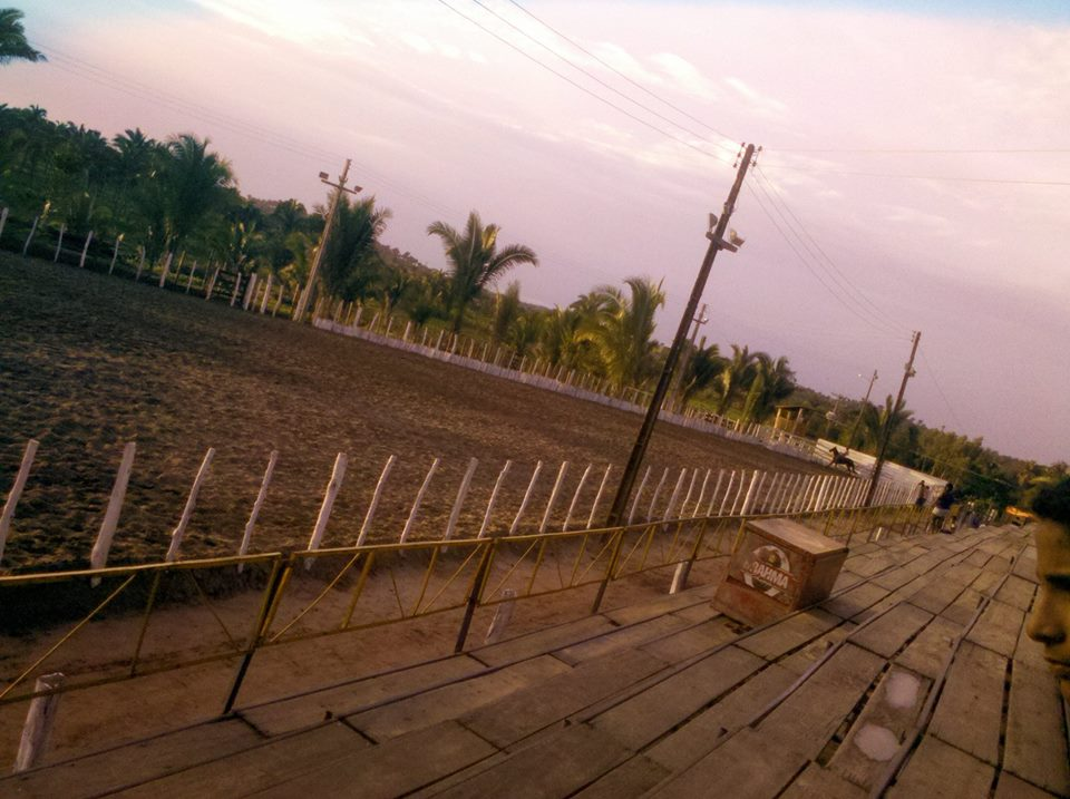 UM DOS MEIOS DE LAZER DO POVOADO.